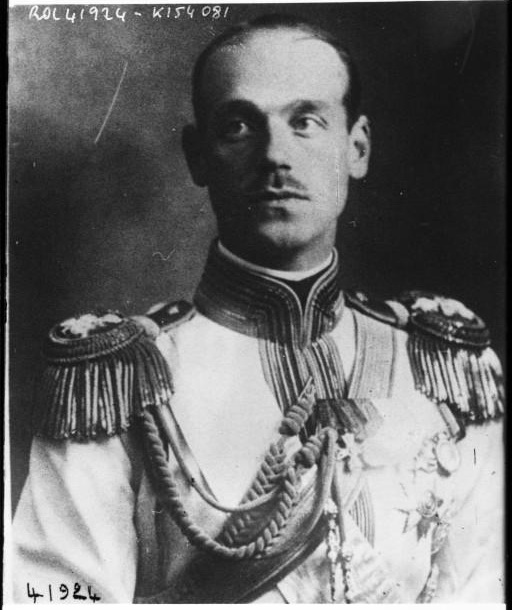 Великий князь Михаил Александрович, награжденный орденом св. Георгия 4-й ст.